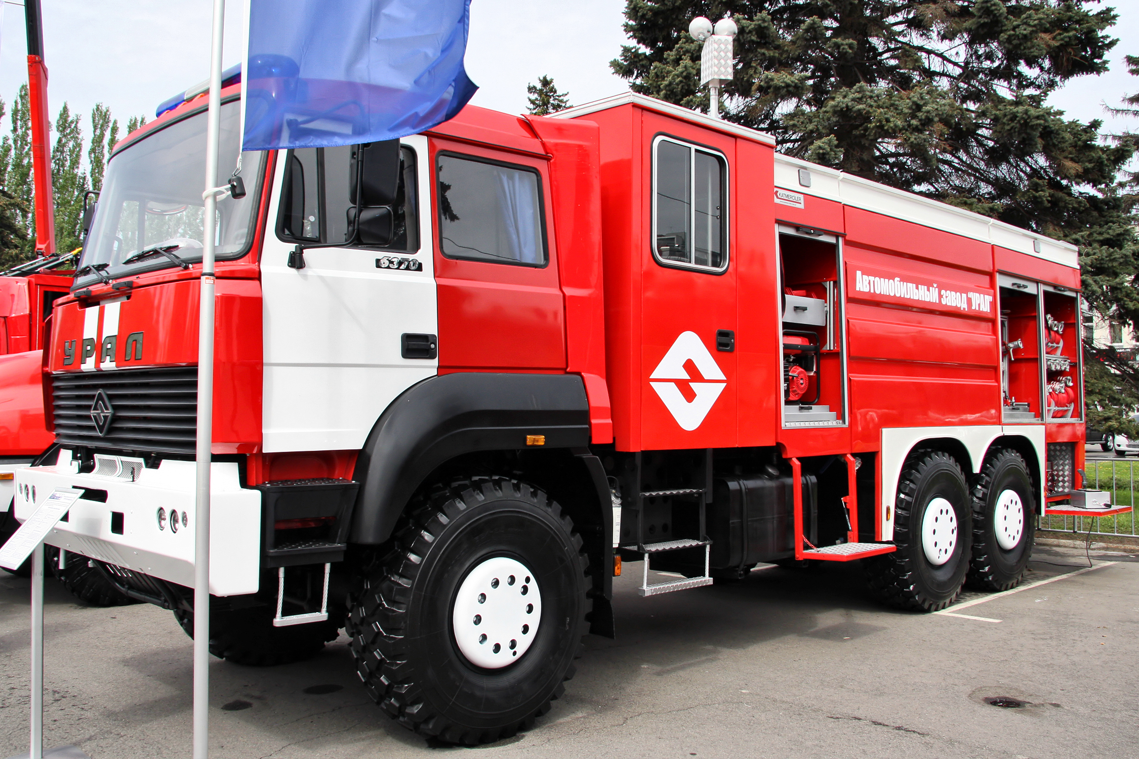 Автоцистерна АЦ-8,0-67 УРАЛ-Катмерджилер на шасси УРАЛ-63701 (Fire fighting vehicle ATs-8,0-67 URAL-Katmerciler on URAL-63701 chassis)